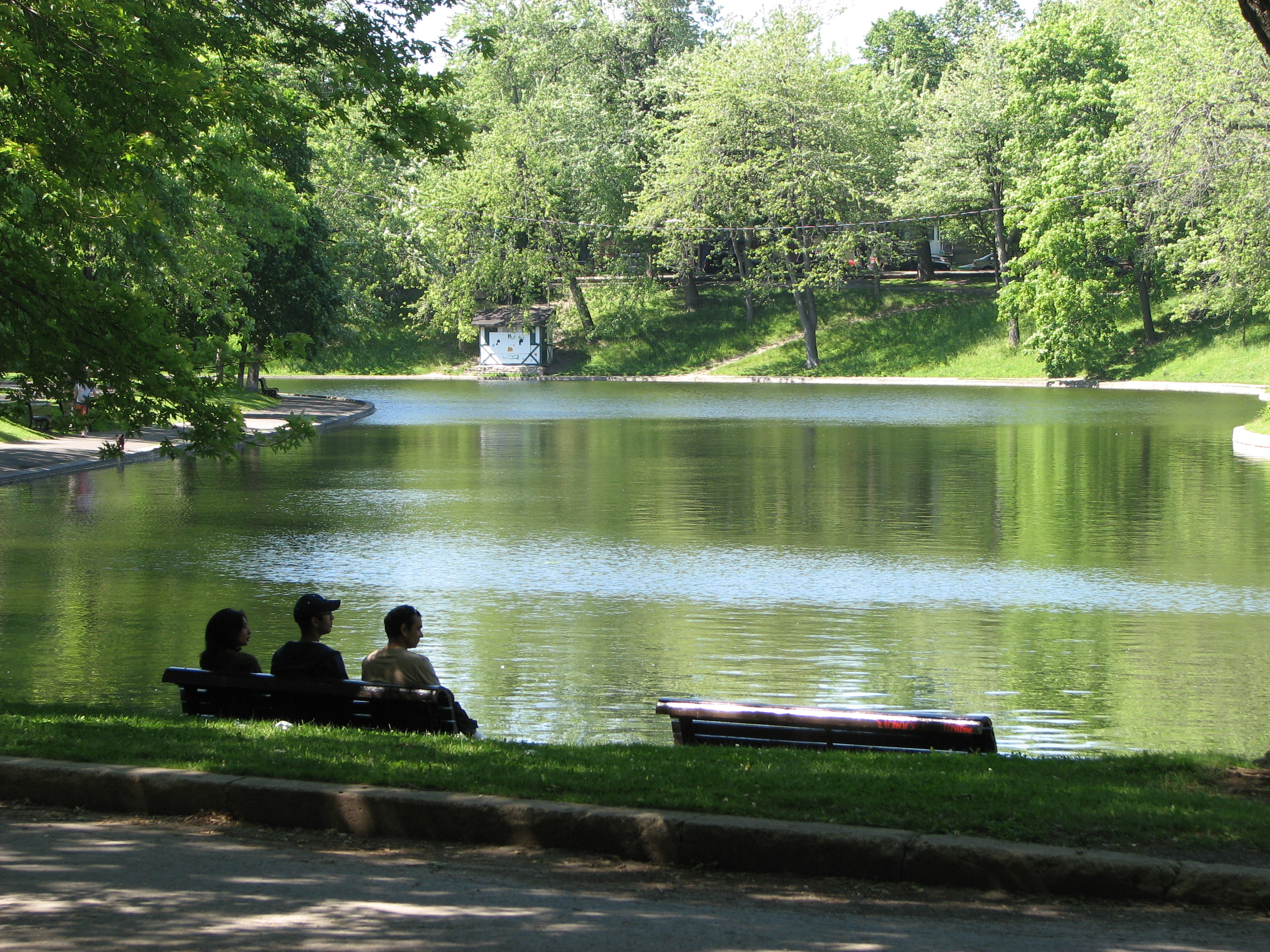 Bassin du Parc Lafontaine (Montréal)